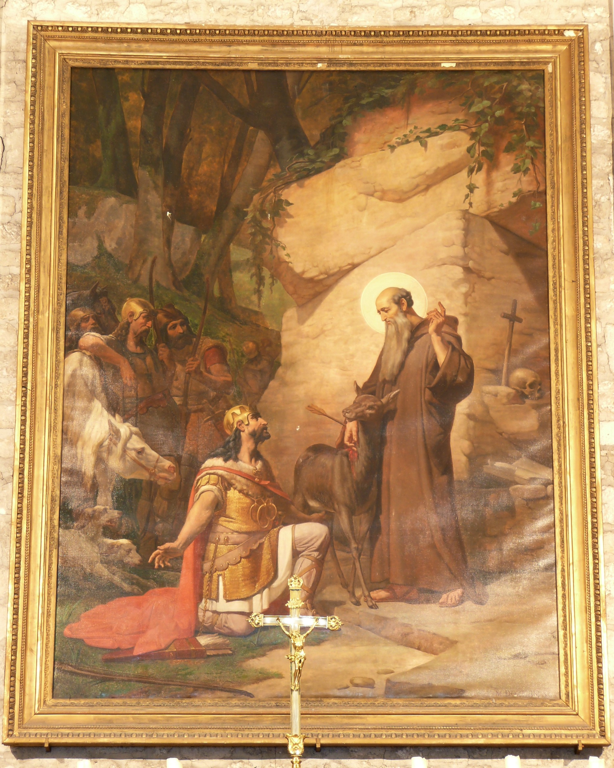 Saint-Gilles (Gard, France), intérieur de l'ancienne église abbatiale, aujourd'hui paroissiale. Toile médiane du chœur représentant le roi Wamba aux pieds de St Gilles par le peintre gardois Melchior Doze.